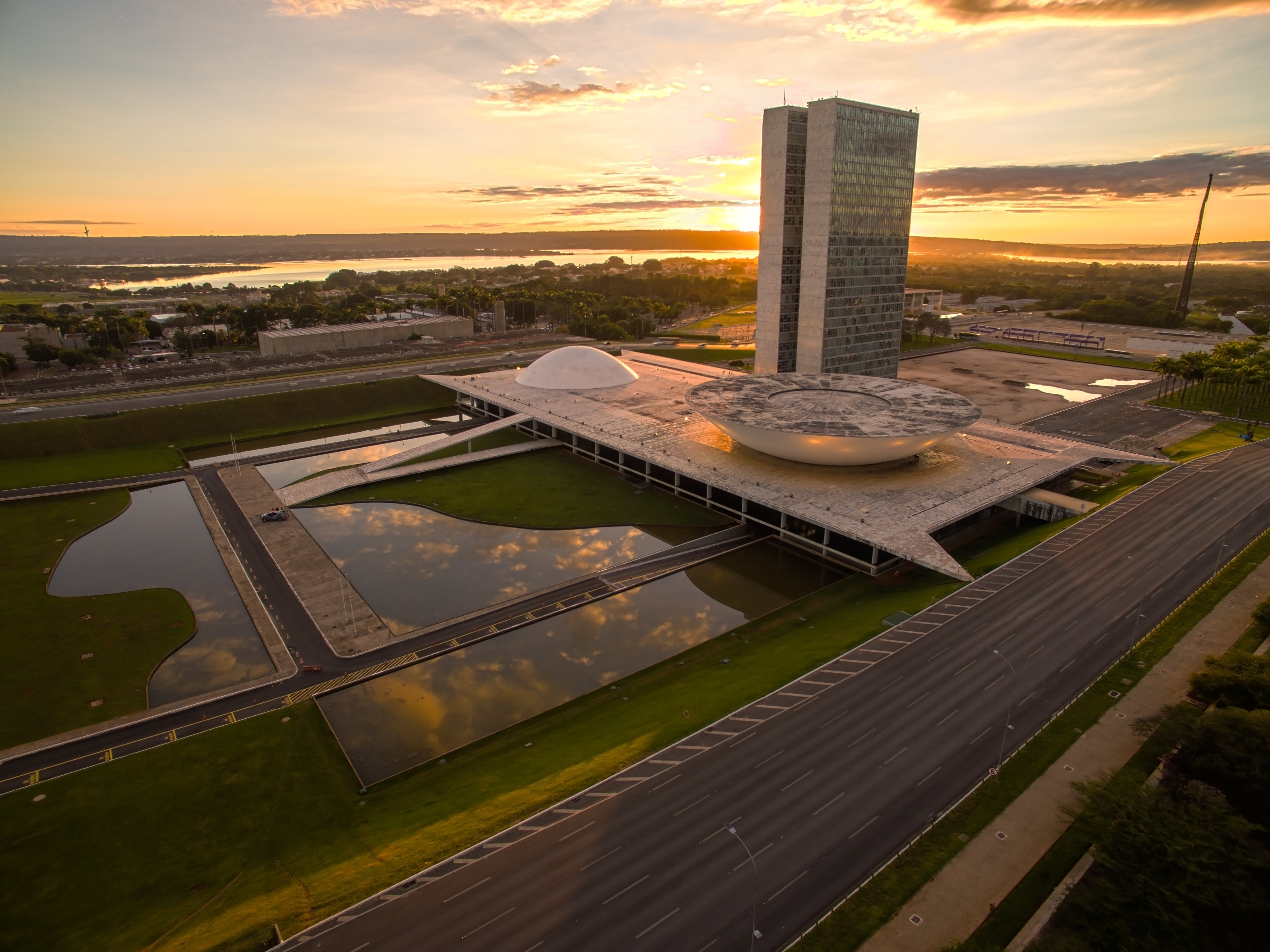 Congresso Nacional em Brasília